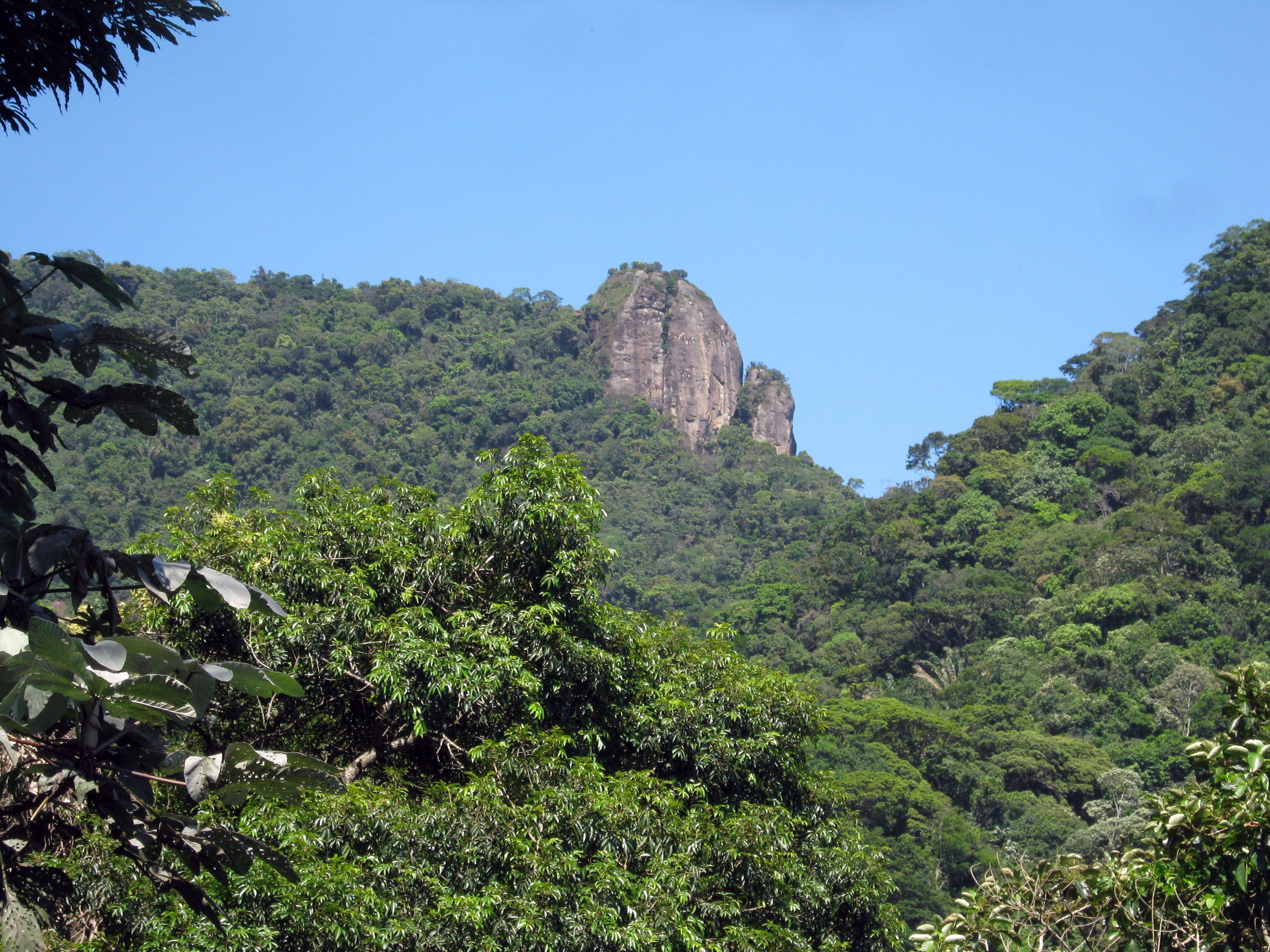 Floresta da Tijuca - Vista do Excelsior